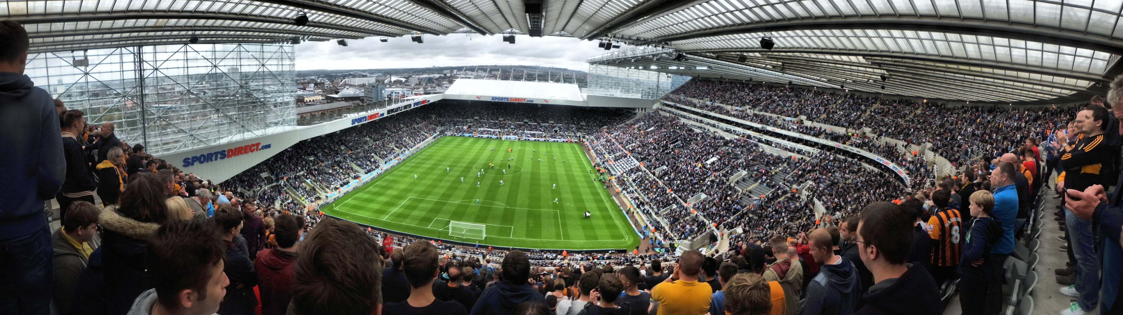 EPL